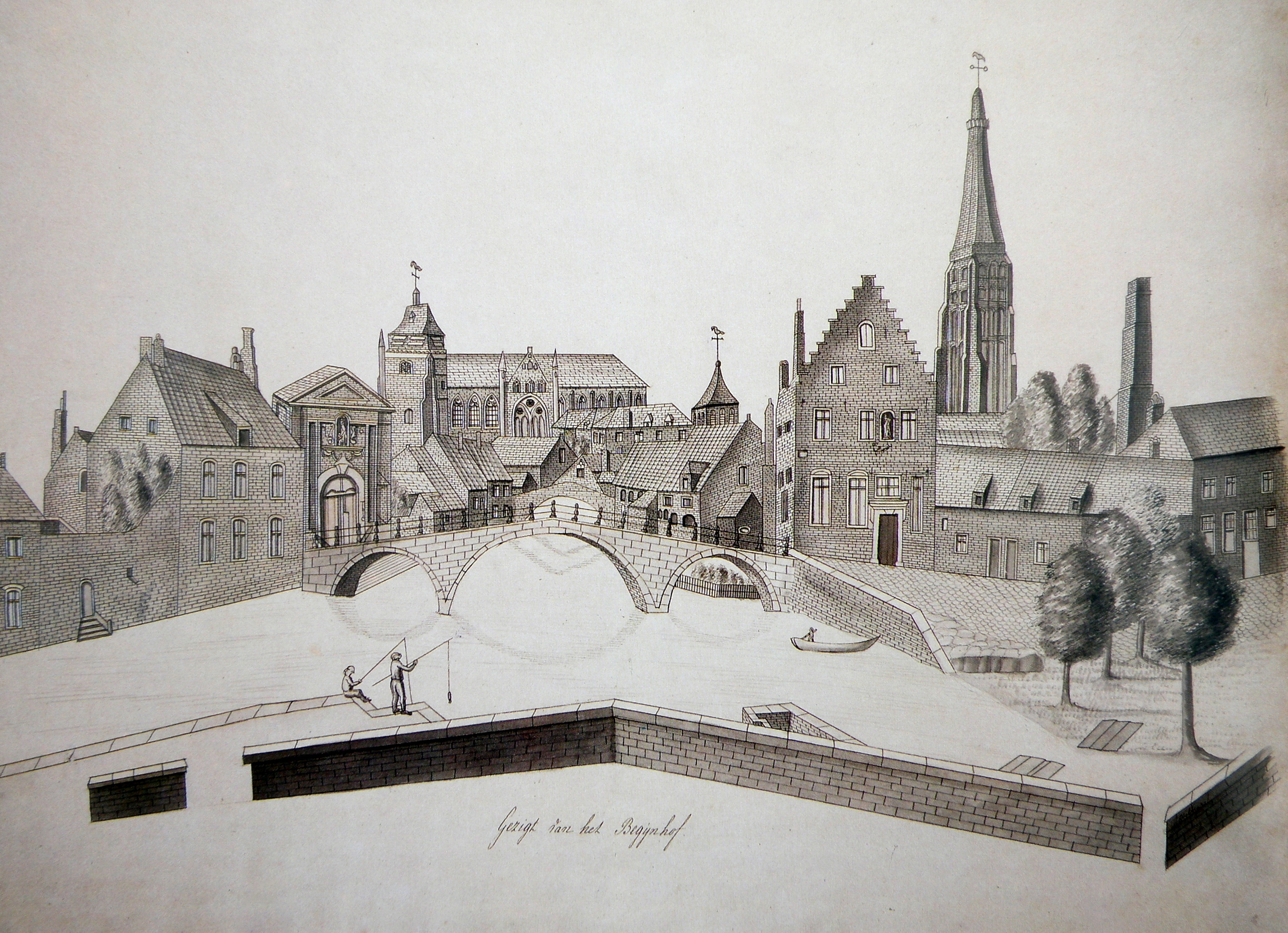 La Reie près du béguinage, par Jean-Jacques Gailliard (1801-1867), non daté (entre 1833 et 1839). Bruges Musées municipaux (Stedelijke Musea). Reproduit dans Marc Ryckaert, Historische stedenatlas van België. Brugge, éd. Crédit communal de Belgique, p. 34.